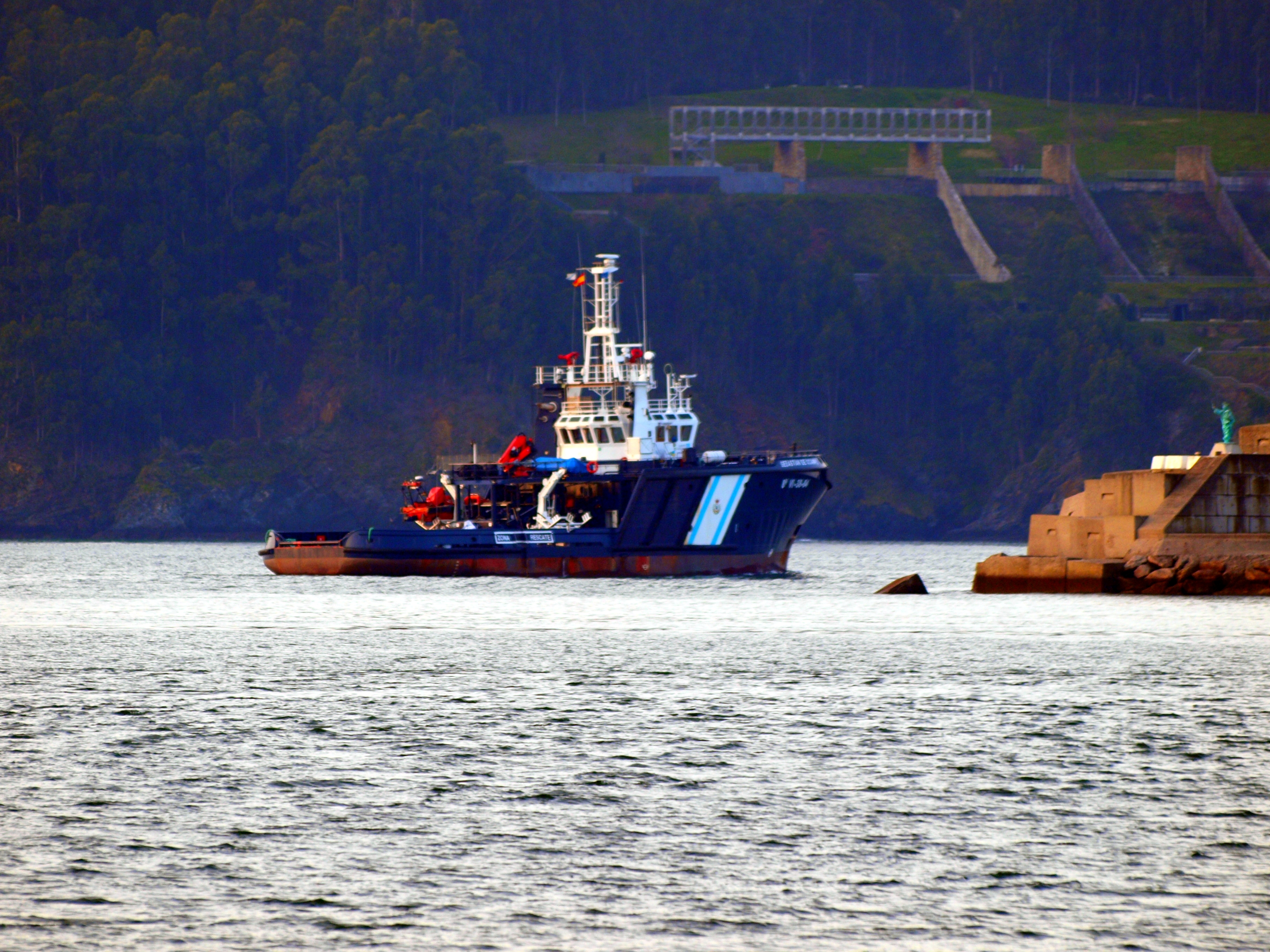 Buque remolcador Sebastián de Ocampo, del Servicio de Guardacostas de Galicia. IMO: 9329021 MMSI: 224111000 Foto tomada con Olympus E-450 + Zuiko 70-300.